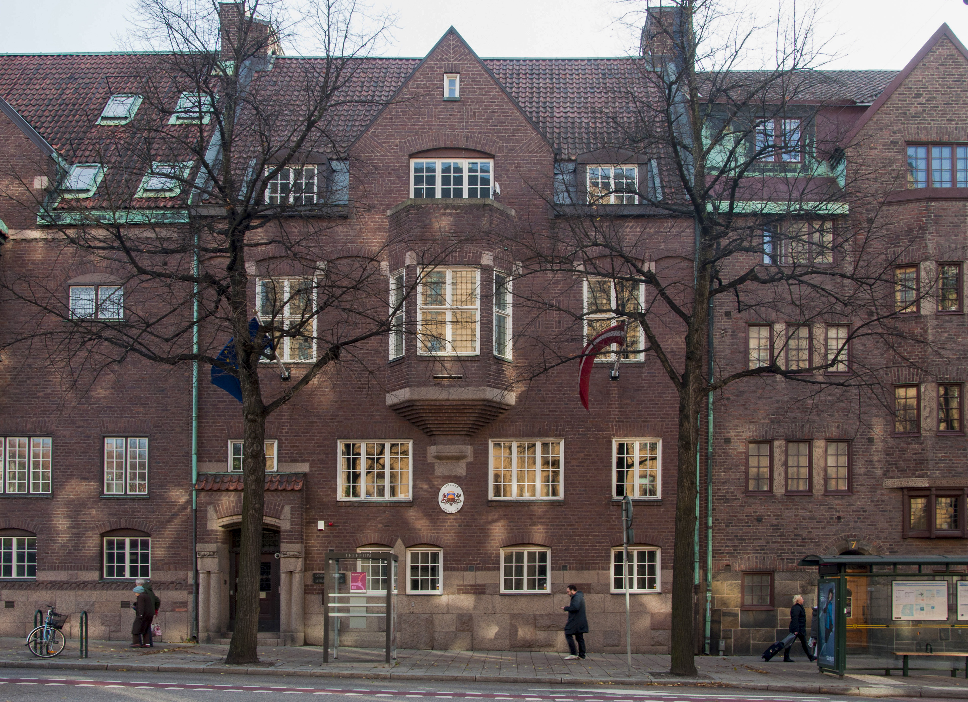 Odengatan, Stockholm. Från vänster; Odengatan 3 (Tofslärkan 7): Byggnadsår 1909-10, arkitekt och byggherre Folke Zettervall, byggmästare F Dahl. Odengatan 5 (Tofslärkan 6) Byggnadsår 1912-14, arkitekt Folke Zettervall, byggherre och byggmästare R Edblom Odengatan 7 (Tofslärkan 5) Byggnadsår 1912, arkitekter G Lindén & Co Almqvist, byggherre och byggmästare N Persson